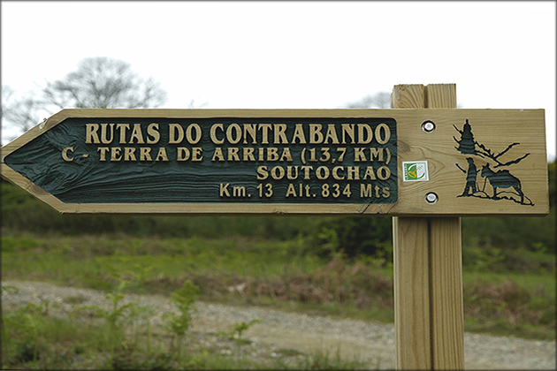 Rutas del contrabando señalizadas como história.